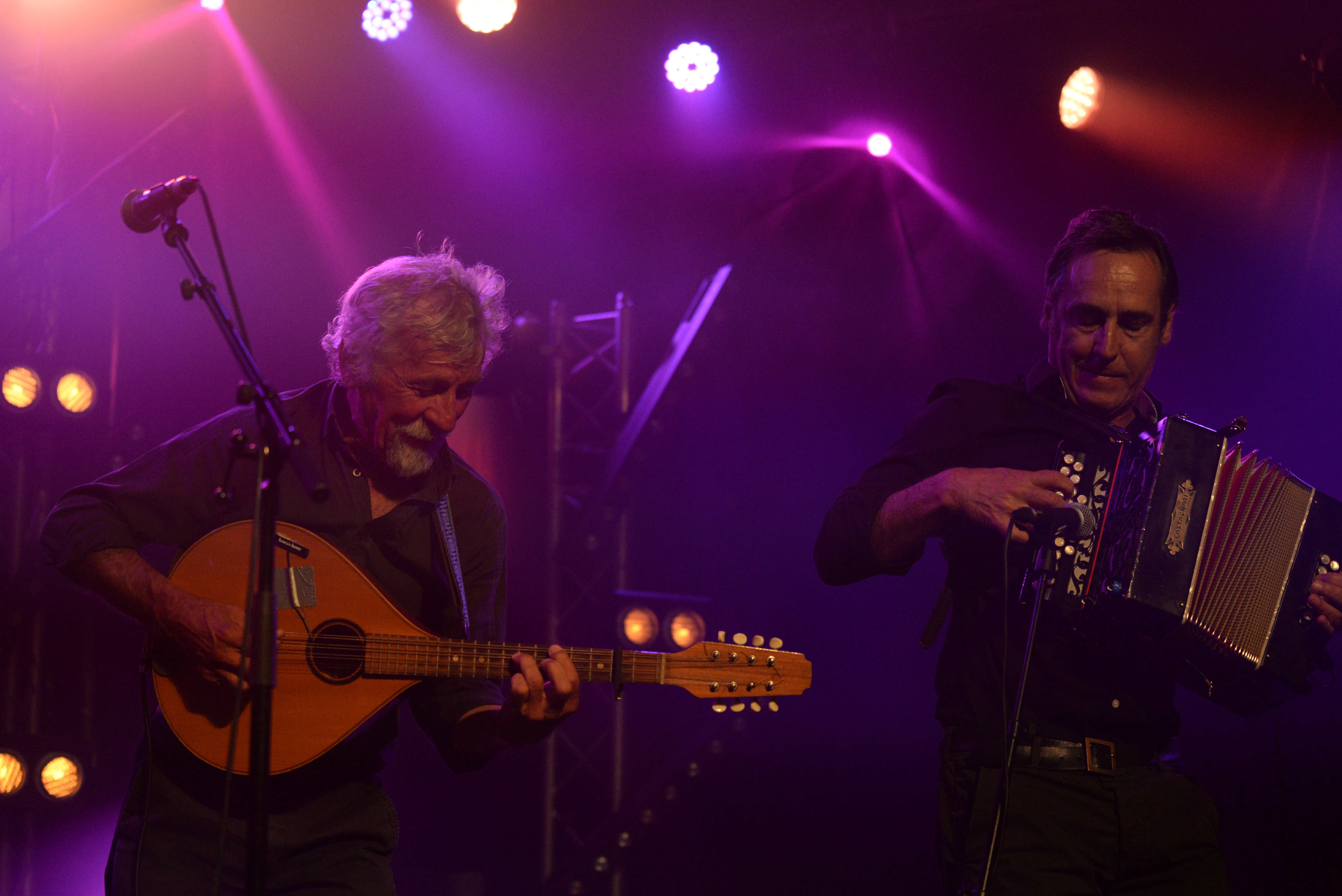 Festival interceltique de Lorient d'août 2016 - Concert final du groupe breton Djiboudjep - Quai de la Bretagne